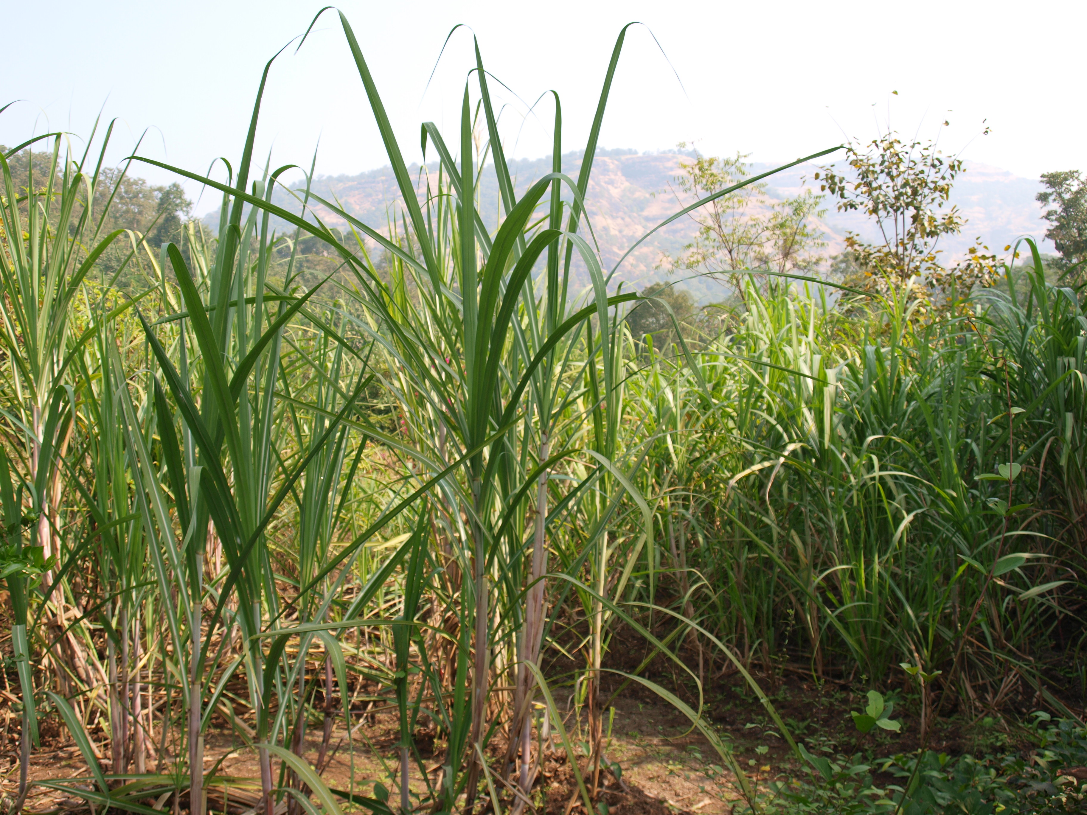 Organiczna trzcina cukrowa